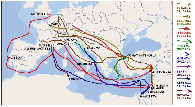 Mapa de las rutas de las Cruzadas